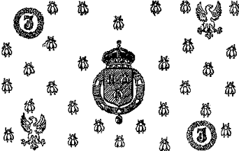 Description : Drapeau de l'Empire du Sahara Auteur : Jacques Lebaudy (décédé depuis 1919)